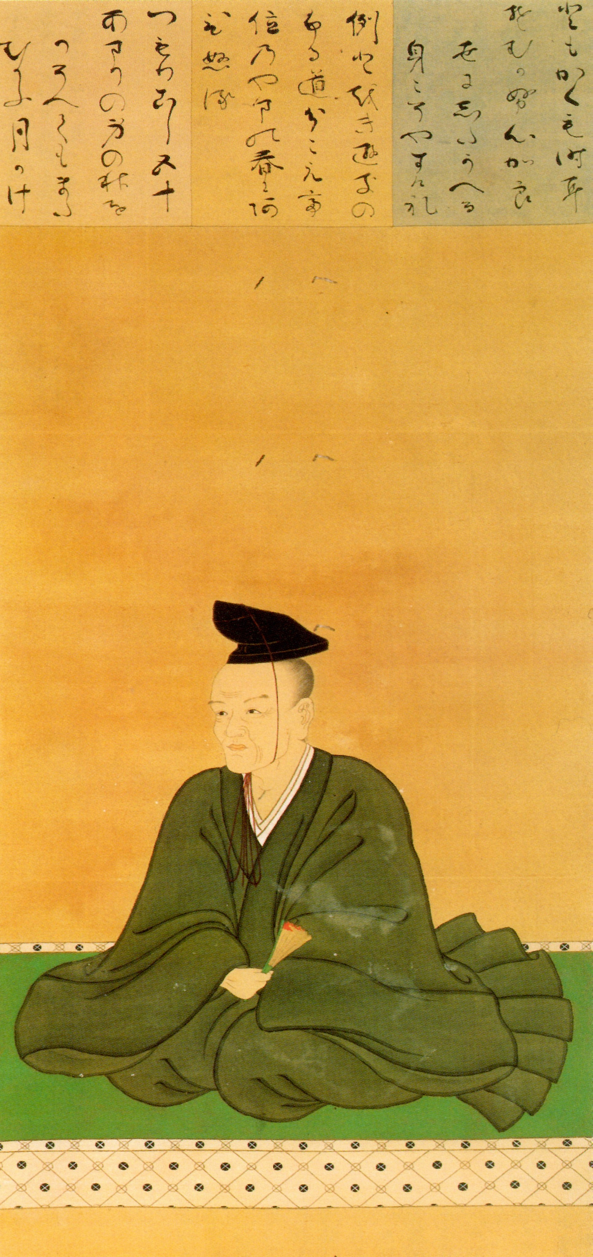 冷泉為久の肖像。